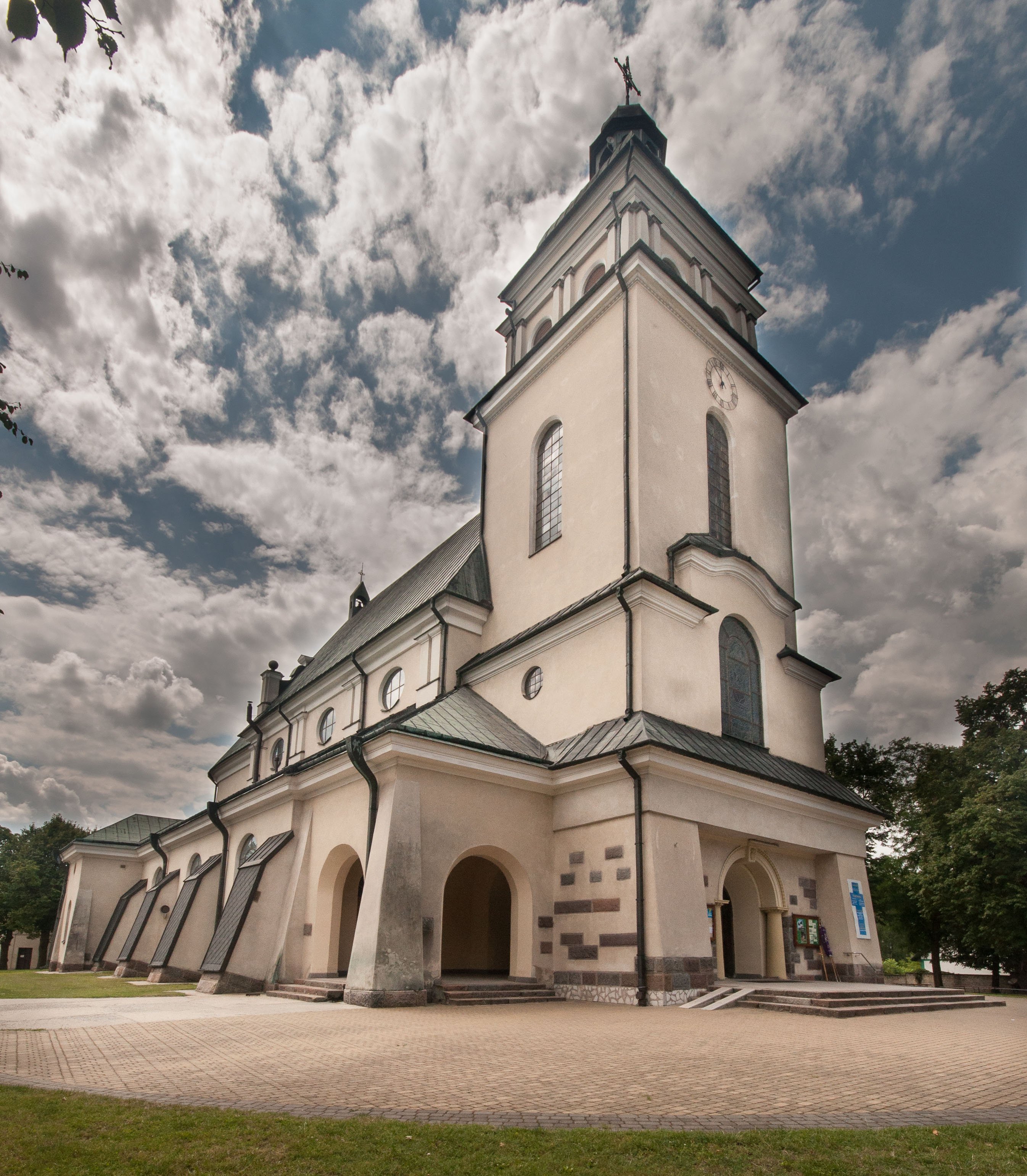 Biłgoraj - kościół rzymskokatolicki p.w. św. Marii Magdaleny, tzw. W Puszczy, 1921-1928